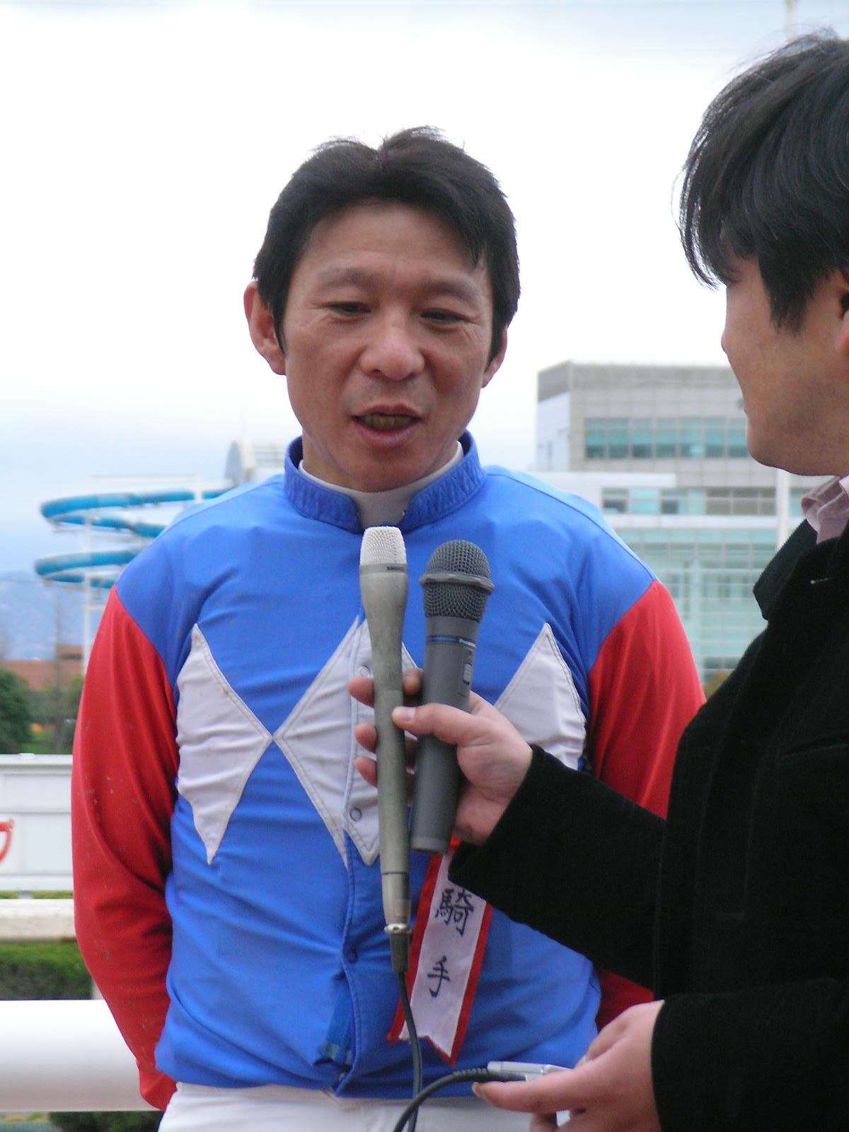 川原正一 撮影日: 2006年4月13日 撮影場所: 園田競馬場 撮影者: りえたん